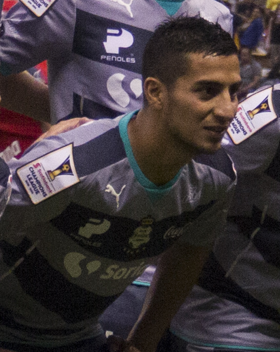 América vs Santos